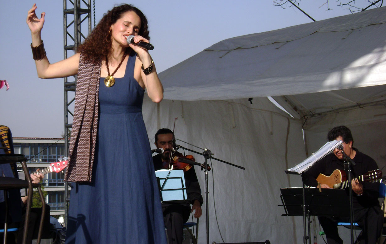 Susana Harp en Ciudad Universitaria de la Ciudad de México en 2008.